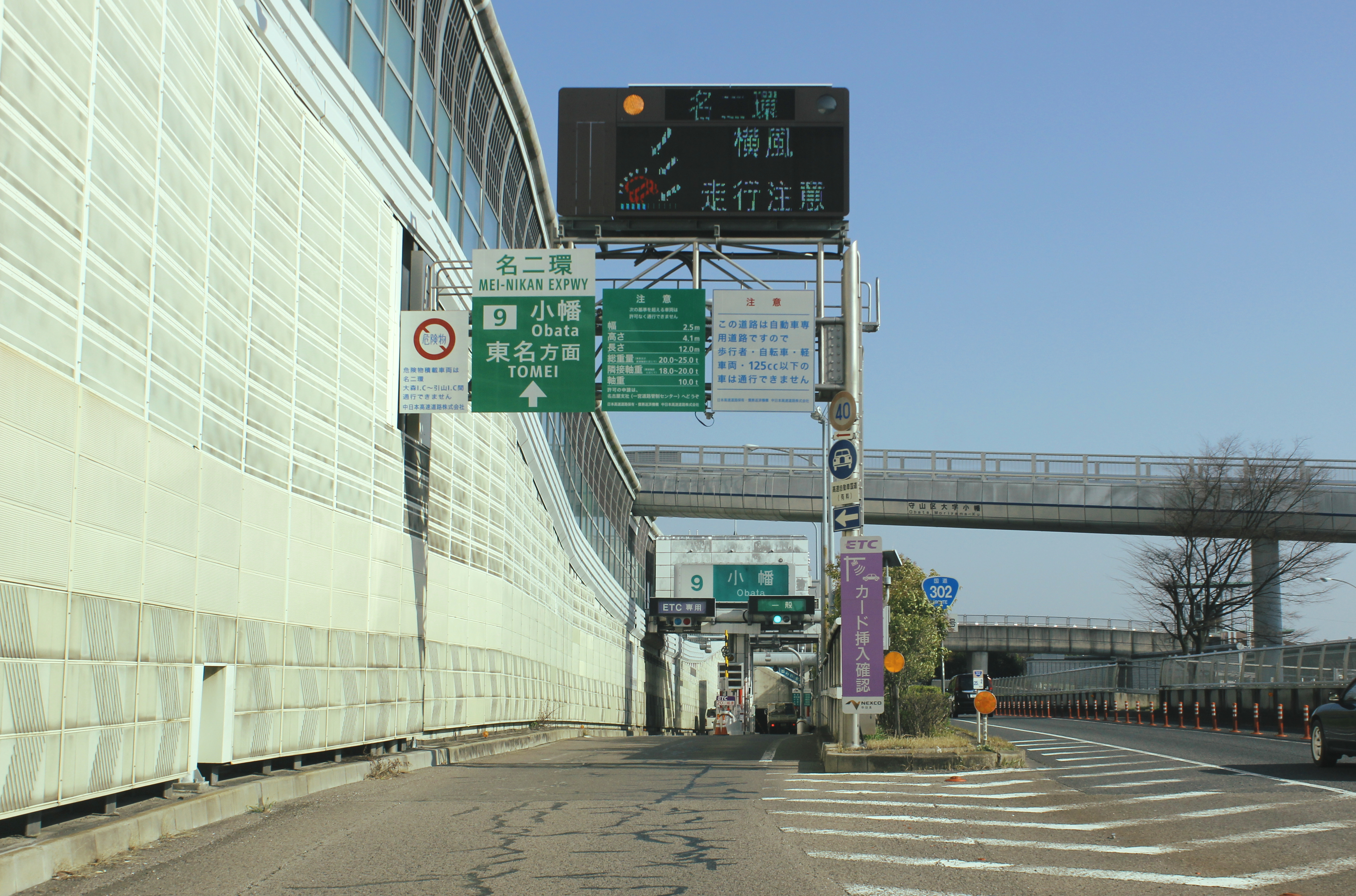 名古屋第二環状自動車道 小幡IC